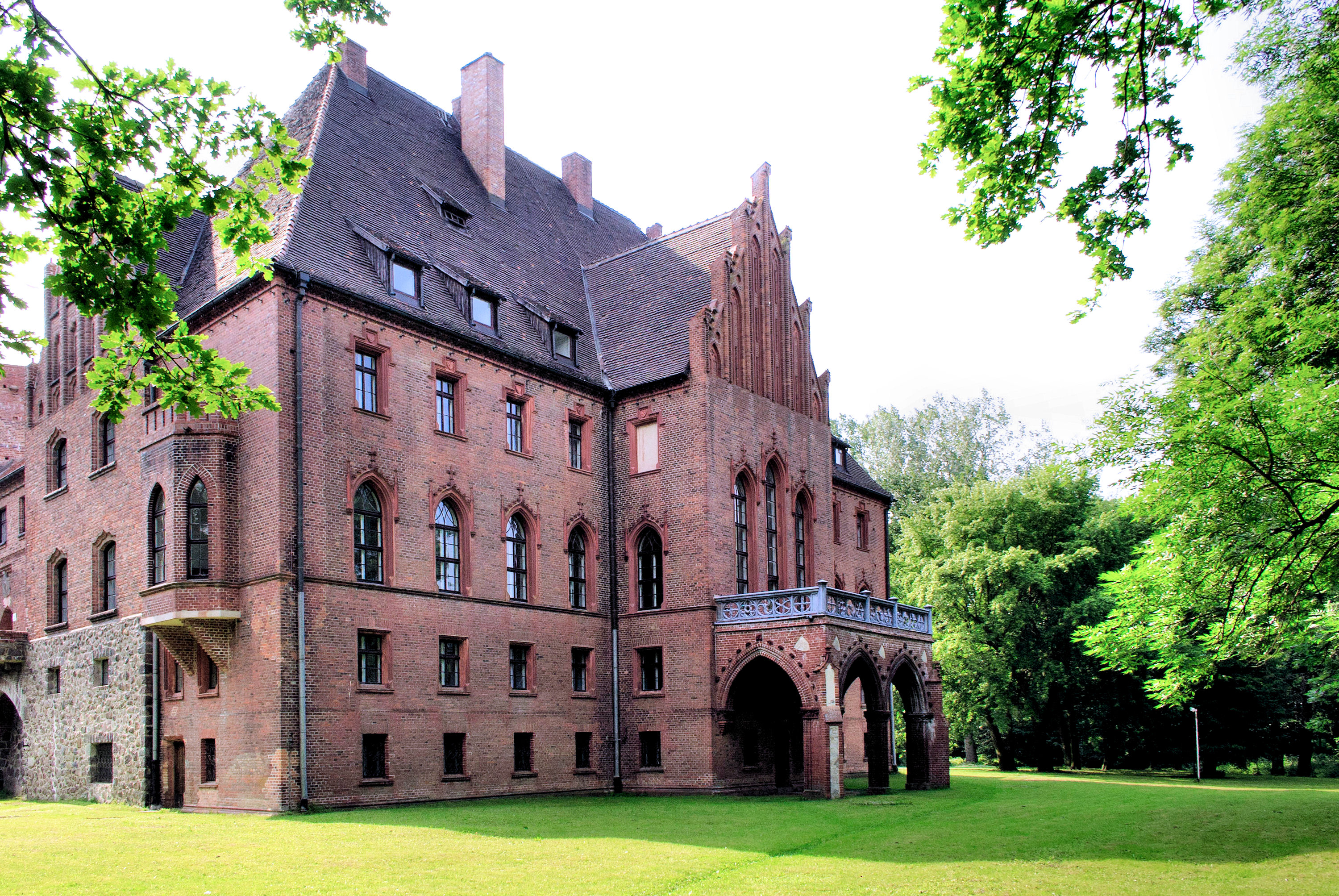 Pęzino - zespół zamkowy